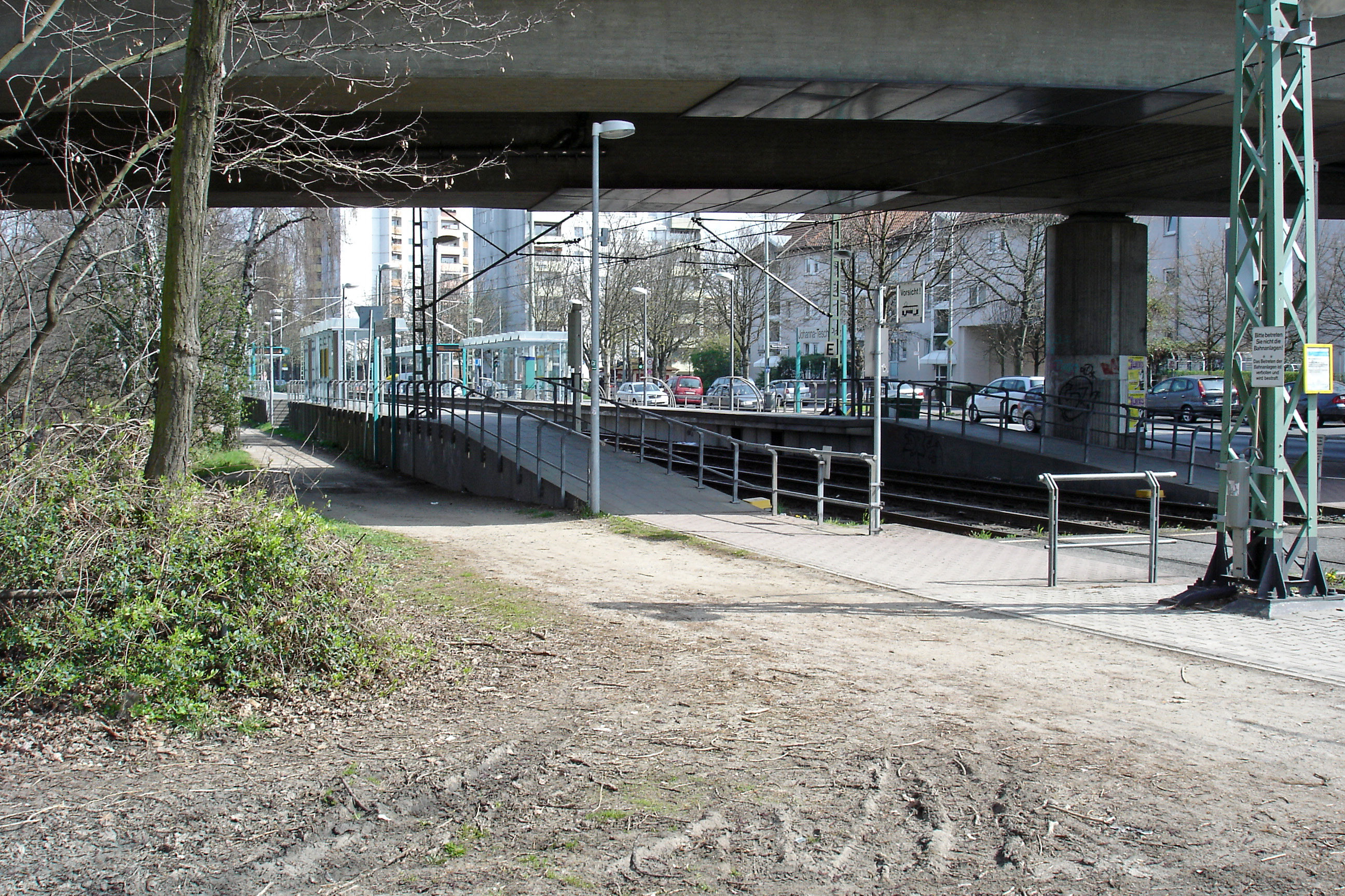 Station Johanna-Tesch-Platz in Ffm-Riederwald, Blick Richtung Osten